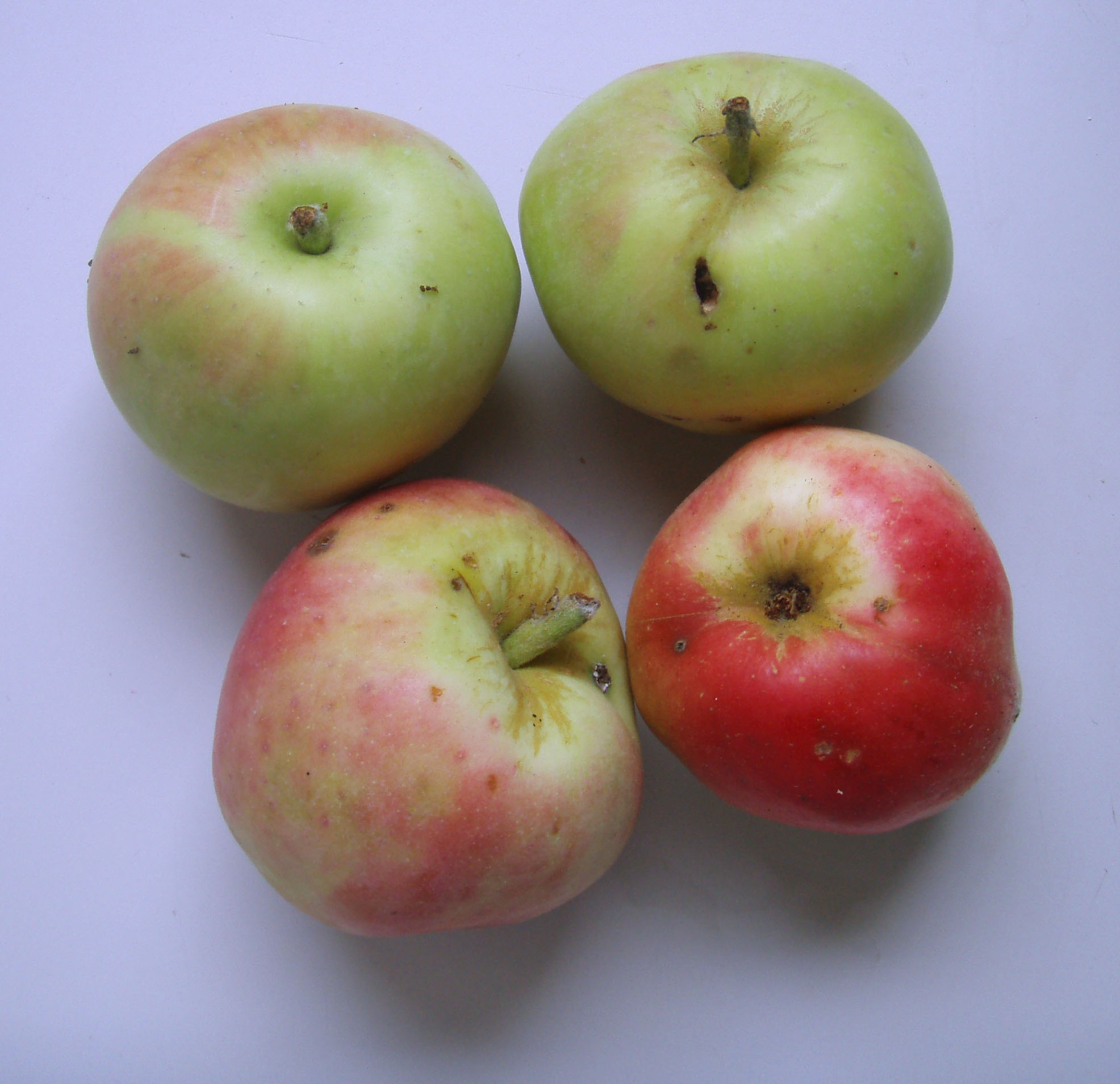 Јабуке Петроваче, снимио Ранко Томић